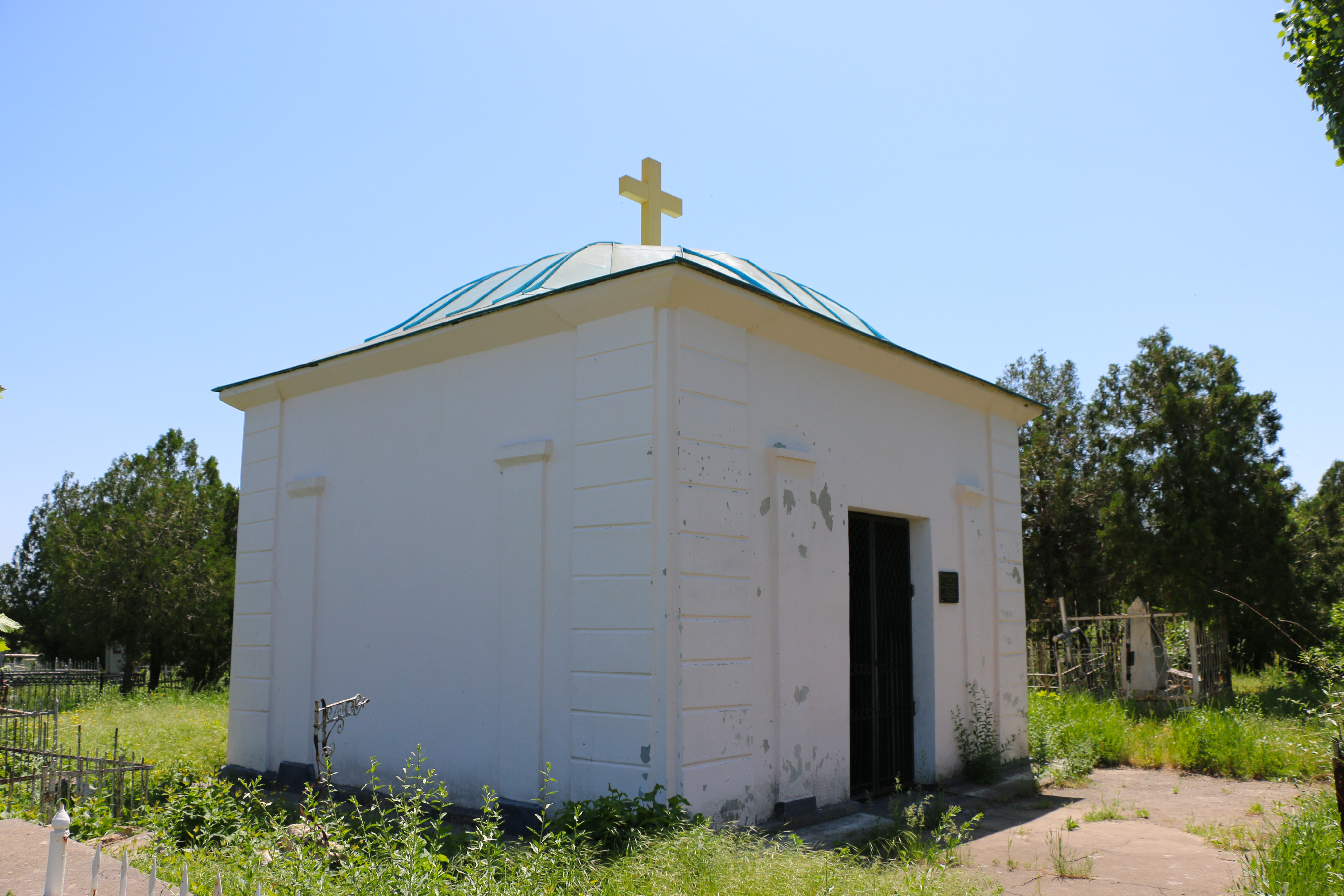 Могила-склеп вченого, винахідника і громадського діяча В.Н. Каразіна, Миколаїв, Некрополь (старий цивільний цвинтар) вул. Степова, 35